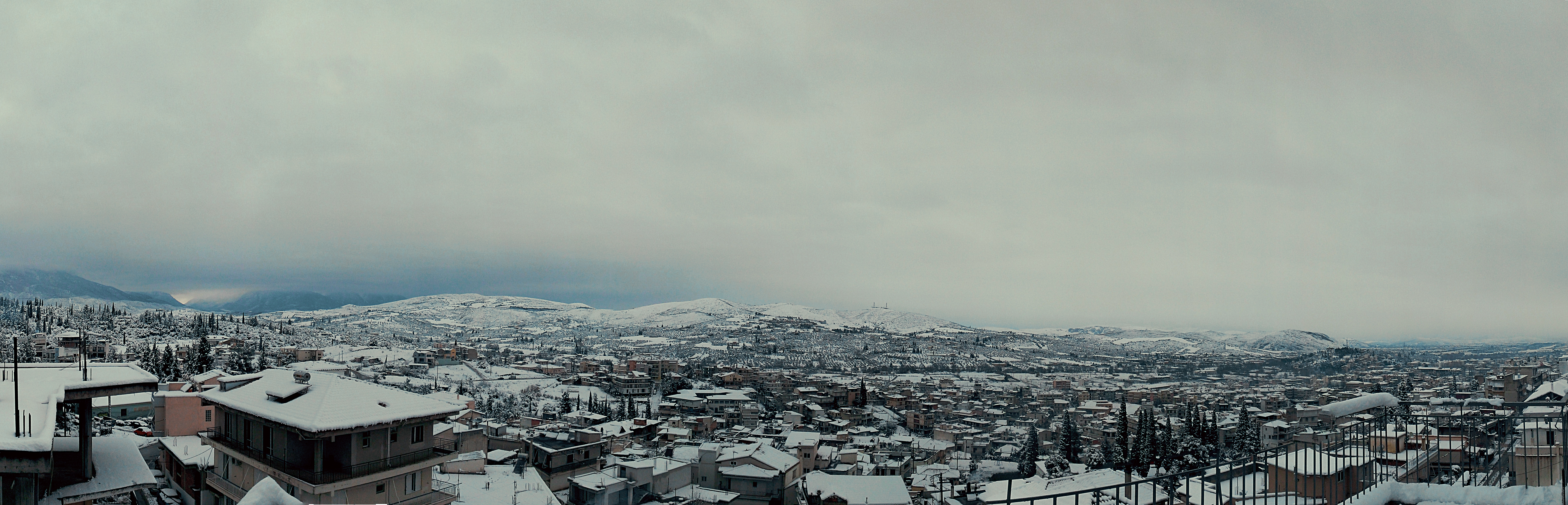 Η Λιβαδειά τον χειμώνα